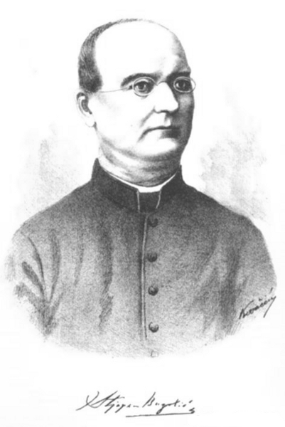 hrvatski svećenik, književnik i pedagog Stjepan Buzolić